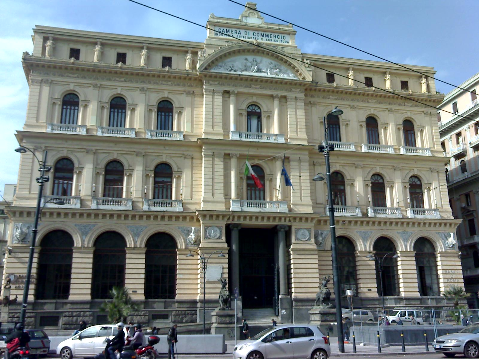 Palazzo della Borsa (Napoli, in Piazza Giovanni Bovio o Piazza Borsa).